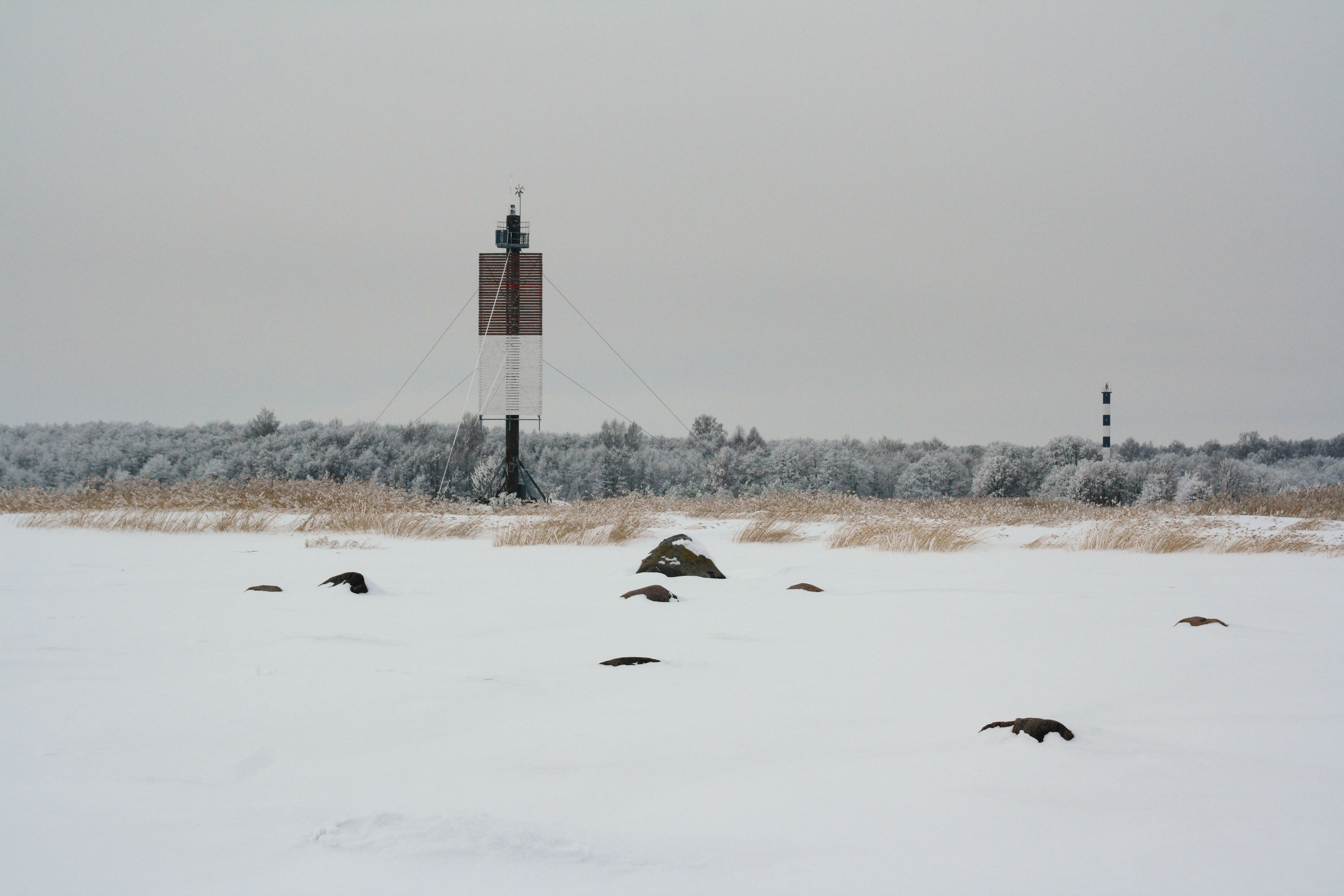 Abruka alumine tulepaak ja Abruka tuletorn.